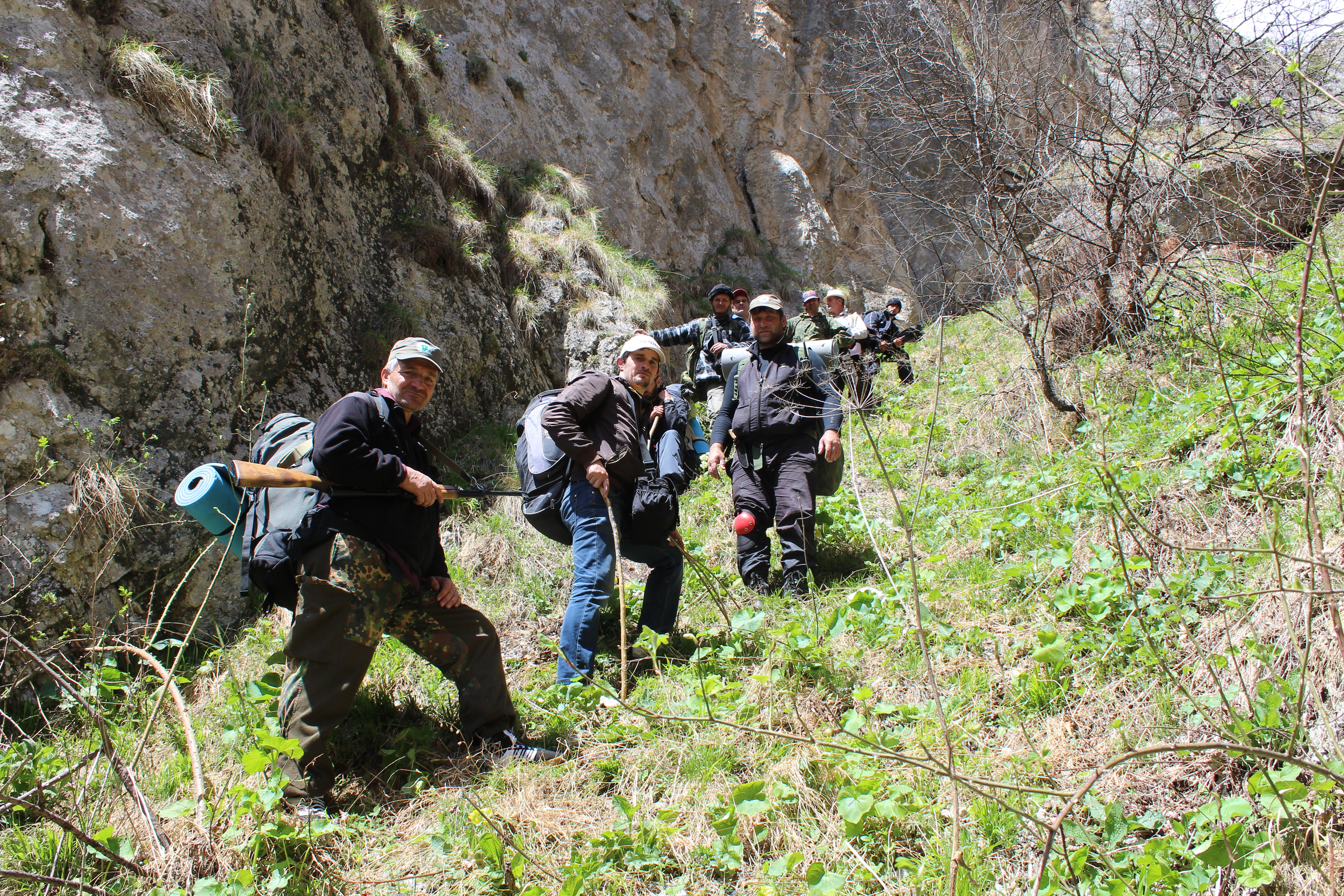 Члены Научно-исследовательской экспедиции " Неизвестная Чечня" Спускаются с Нашхой лам к селению Моц1ара , рядом с Г1арби-Г1ала